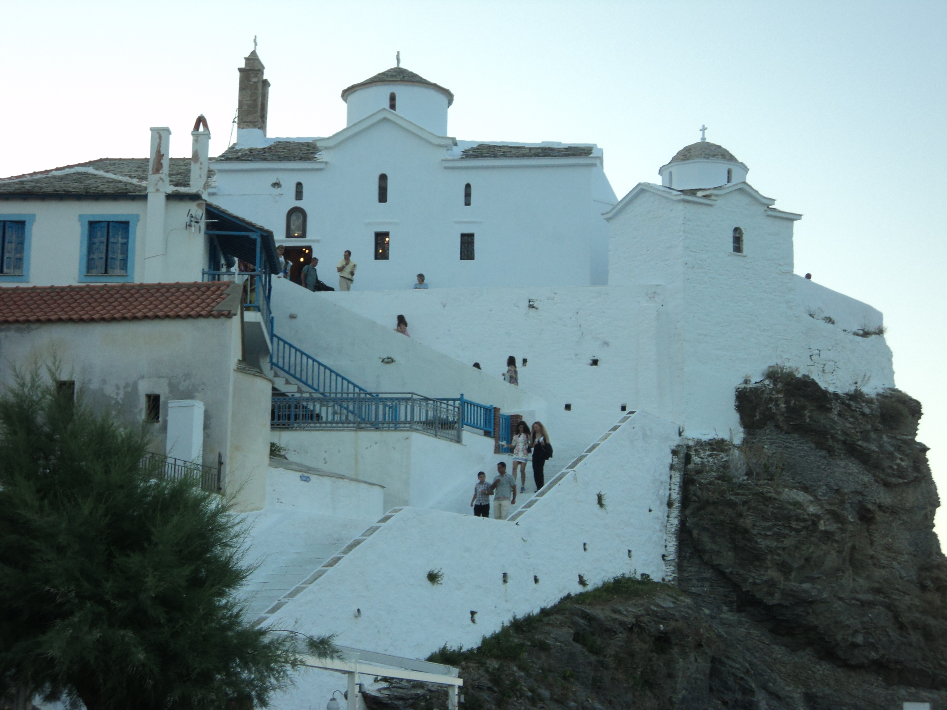 SKOPELOS SPORADES,GREECE